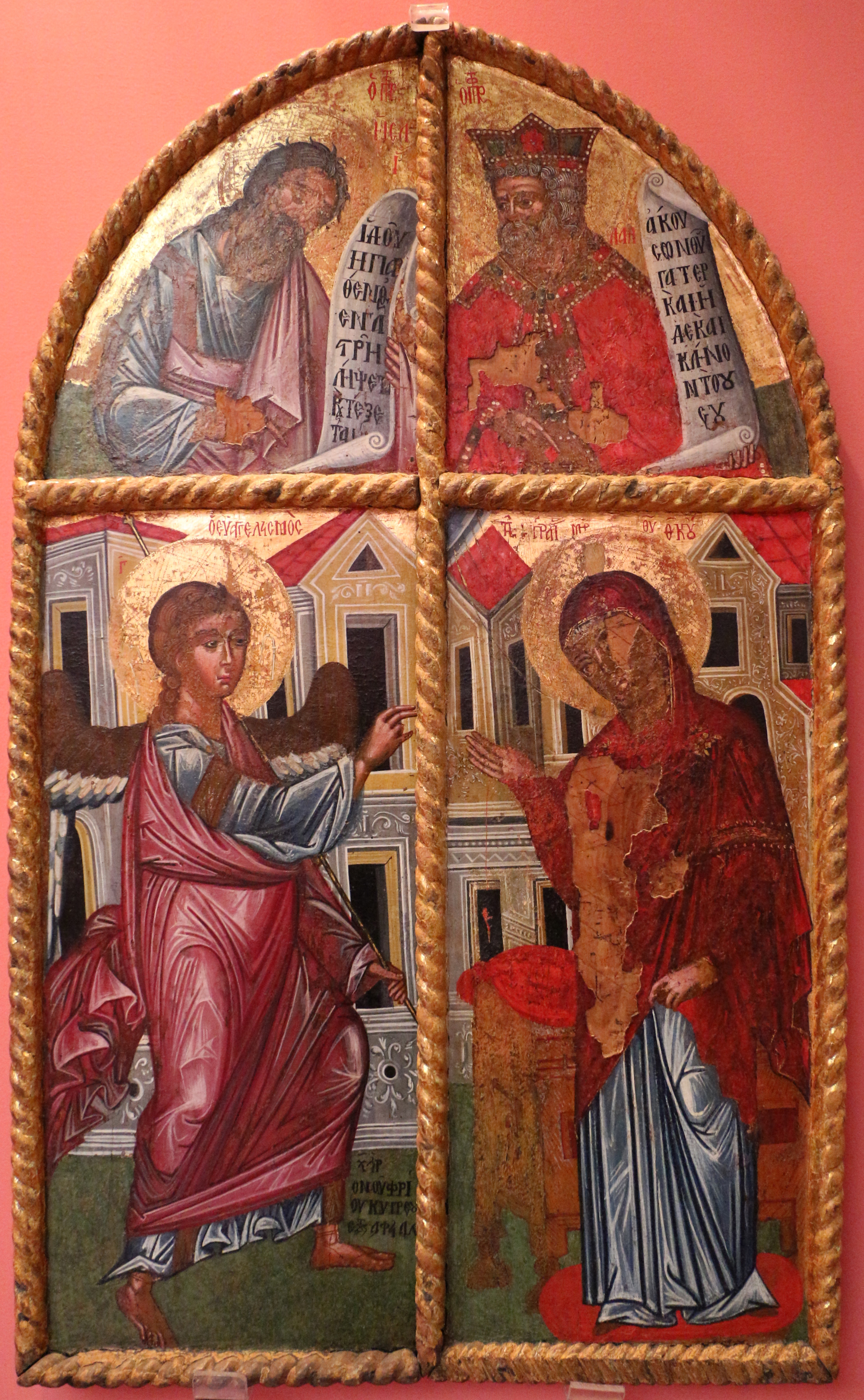 Muzeu Historik Kombëtar